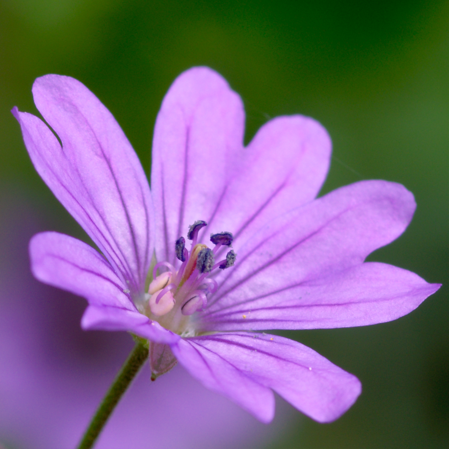 Géranium des Pyrénées